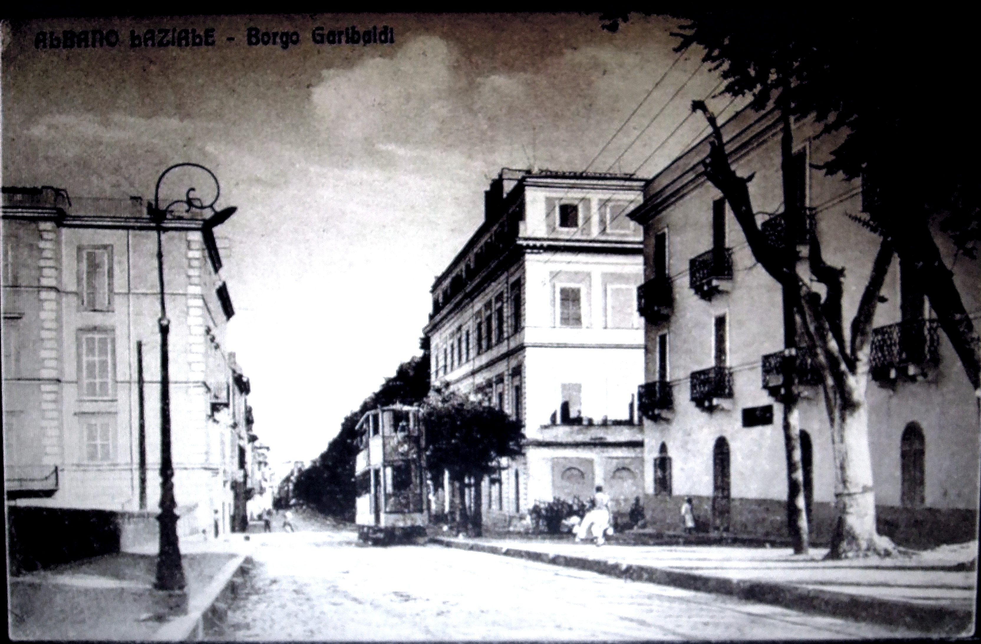 Palazzo del Cav. Arturo Thibault Borgo Garibaldi 333 ad Albano Laziale.